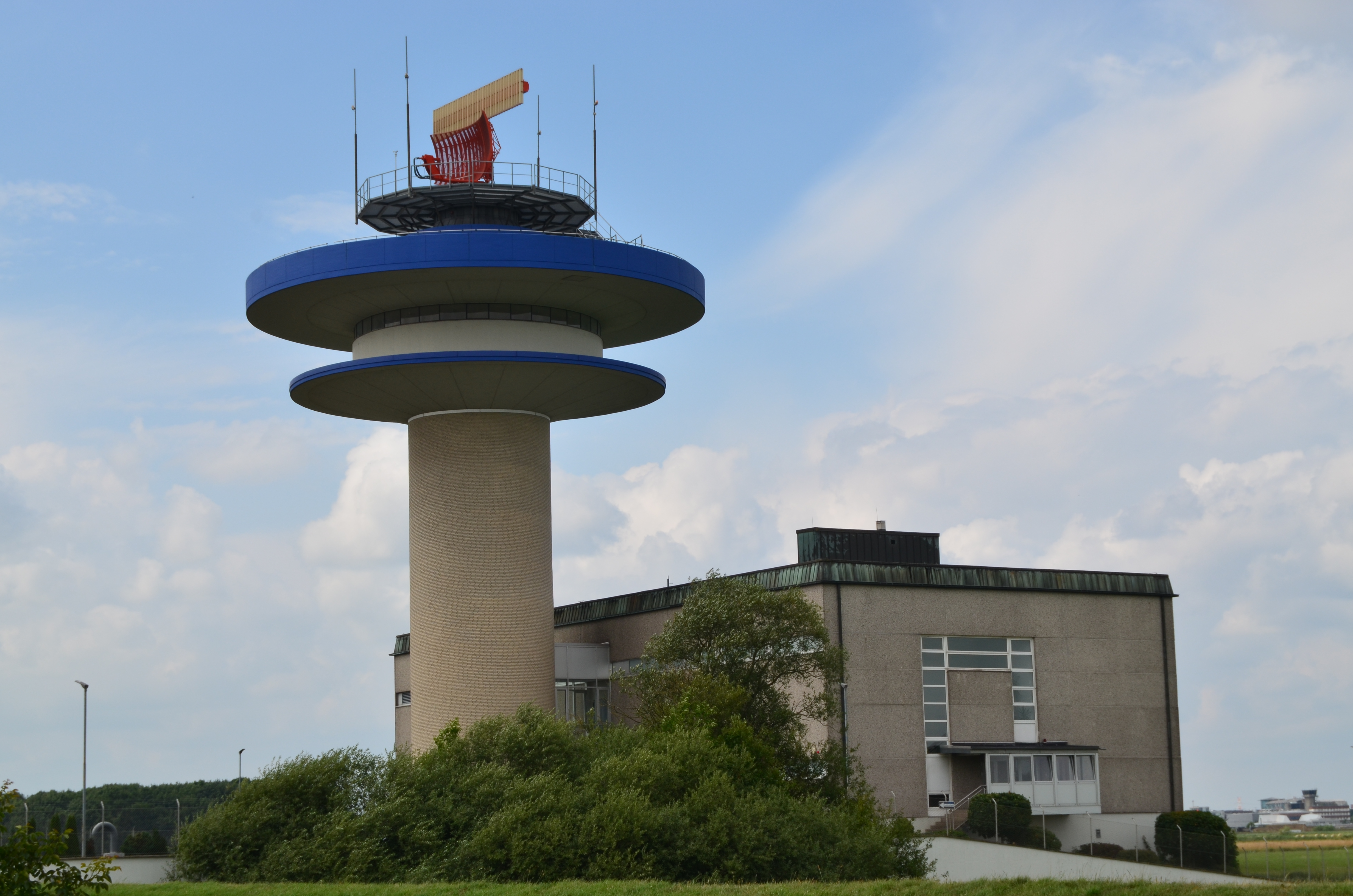 Radarturm der Deutschen Flugsicherung abseits des Flughafens Bremen